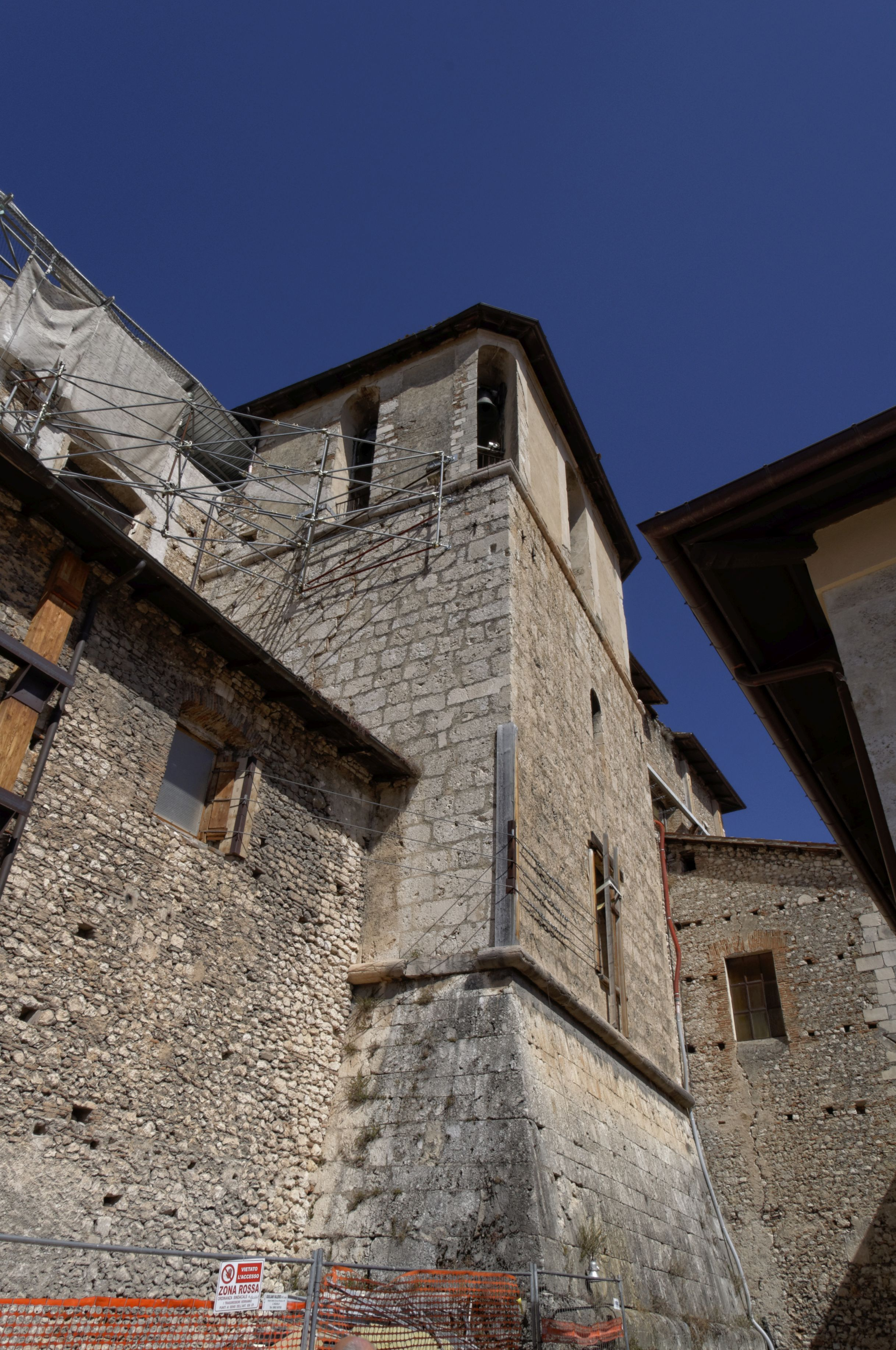 L'Aquila 2017 Dieses Foto entstand in Zusammenarbeit mit Stadtbesichtigungen.de Die Seiten Stadtbesichtigungen.de, der dazugehörige Reise Blog sowie die Facebookseite: Stadtbesichtigungen Rom dürfen dieses Bild für Ihre Veröffentlichungen ohne den Hinweis auf Wikipedia, Commons bzw der Lizenz verwenden. Die Verantwortlichen habe von mir (Ra Boe) die Originaldaten zur freien Verfügung übermittelt bekommen.